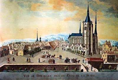 Dessin représentant Dourdan en 1802